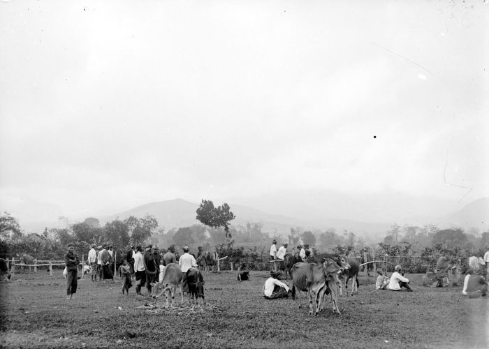 Negatief. Veemarkt bij Poedjon